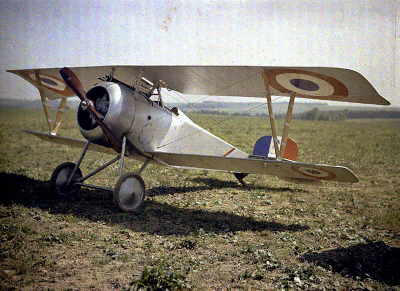 Nieuport 23 C.1 French WWI sesquiplane fighter